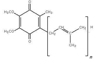 Coenzyme Q ou ubiquinone. avril 2005 Création personnelle. n peut varier de 6 à 10, cette chaîne est une chaîne polyisoprénique.